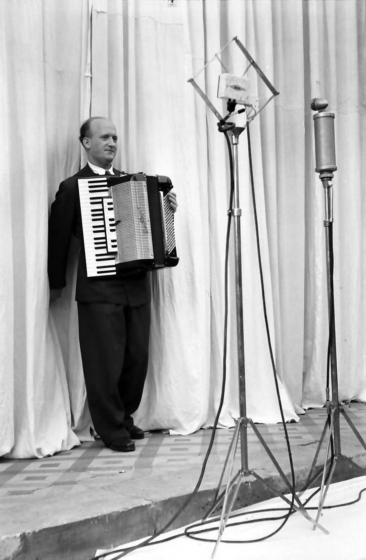 Schloss Güterfelde, Truppenbetreuung: Albert Vossen